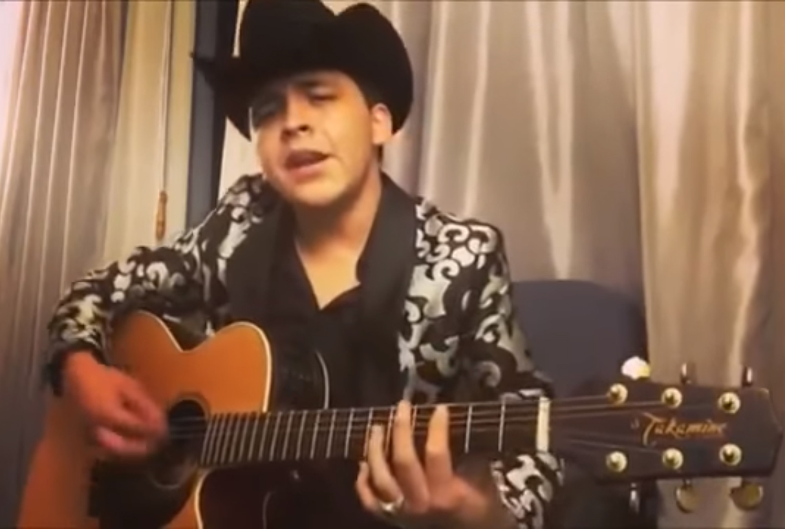 Subscribete No Te Cuesta Nada!!! Para Mas Musica